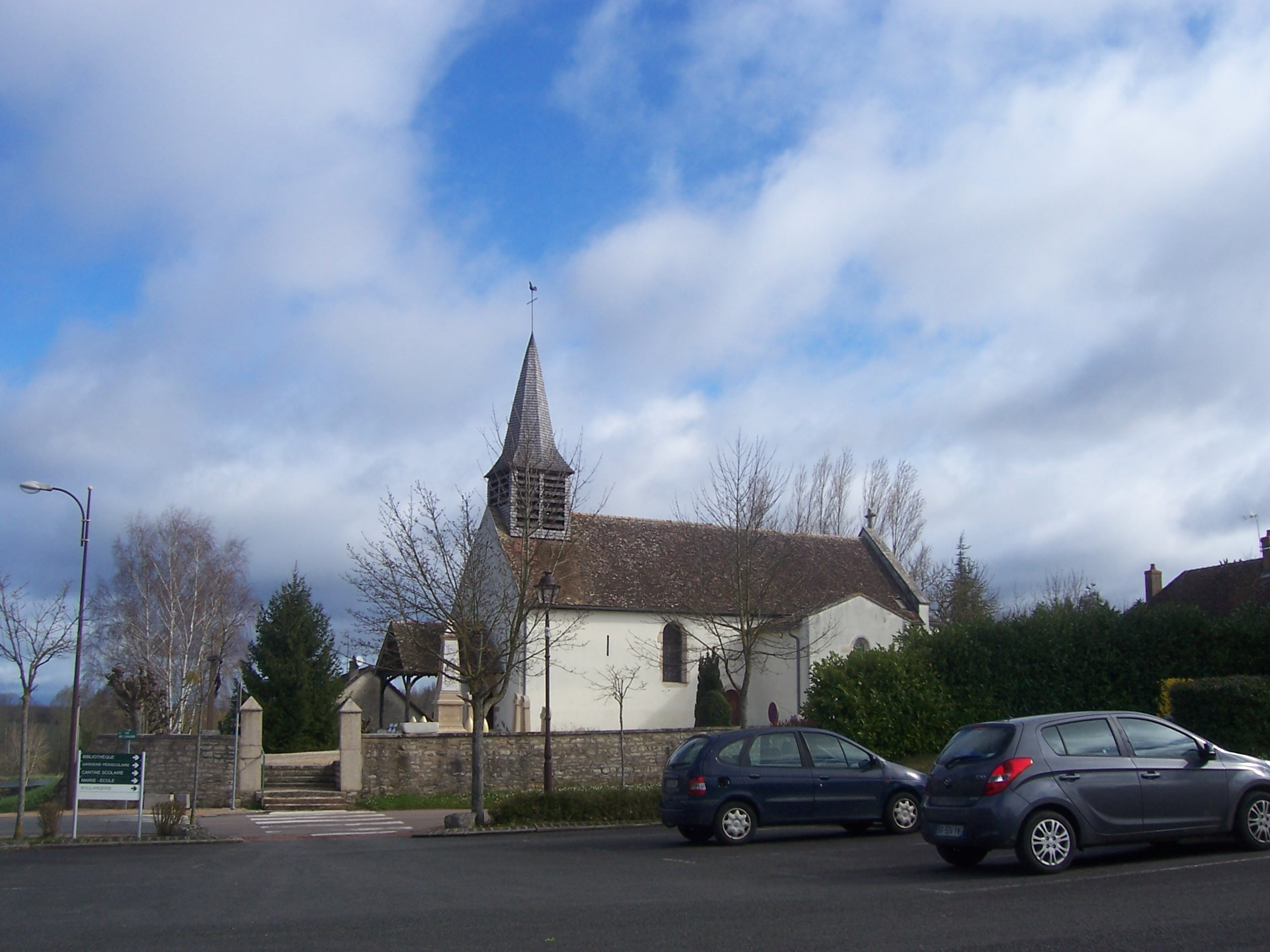 Eglise de l'Abergement-Sainte-Colombe